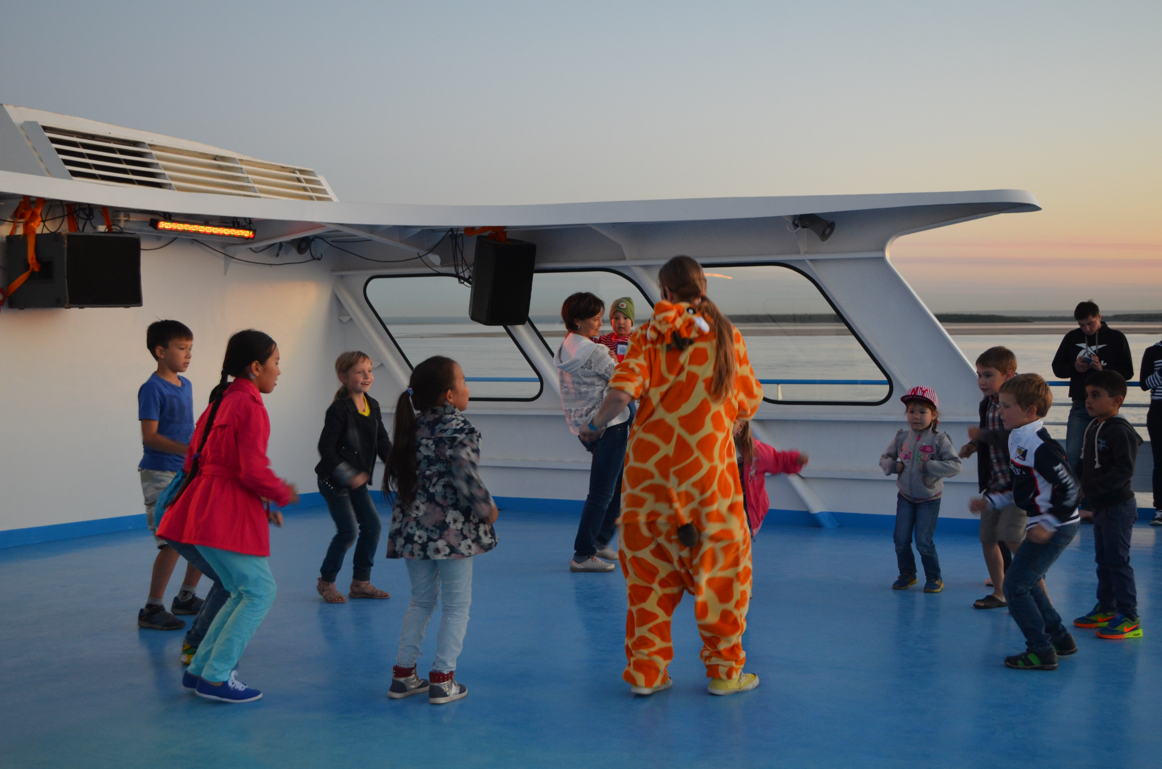 Поездка на Ленские столбы на теплоходе «Демьян Бедный», 31.07.2015 - 02.08.2015. День первый. Дети танцуют на солнечной палубе теплохода.